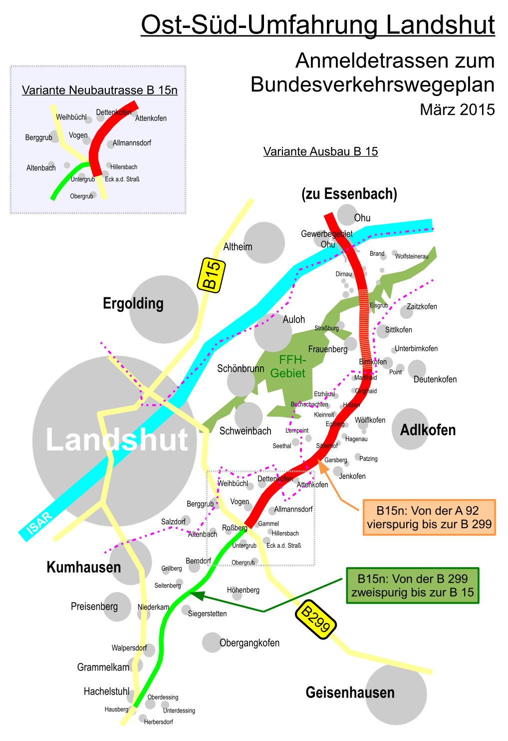 Darstellung der beiden Trassenvarianten der Ost-Süd-Umfahrung Landshuts im Rahmen der Anmeldung der B 15n zum Bundesverkehrswegeplan 2015